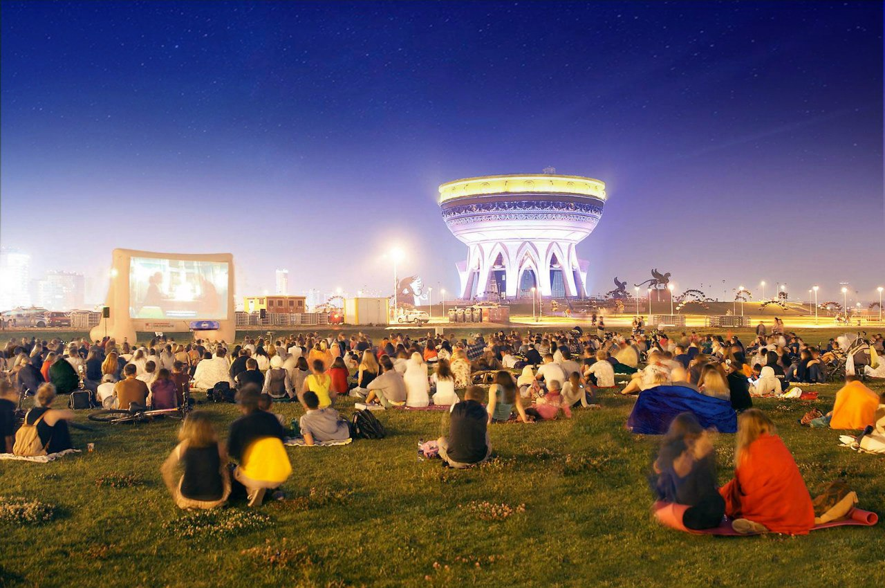 Фестиваль уличного кино в Казани, 2016